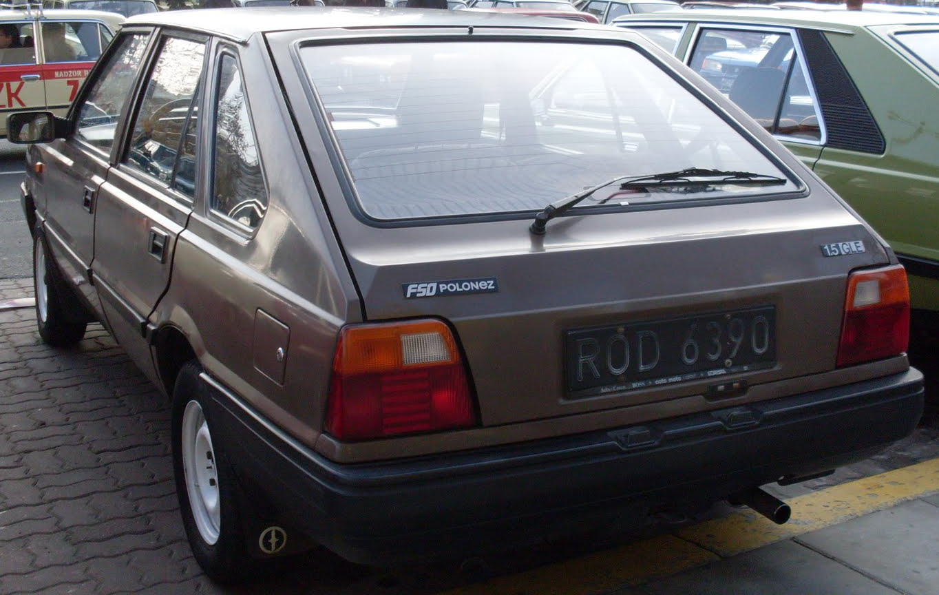 FSO Polonez Caro MR'93 1.5 GLE z 1993 roku.